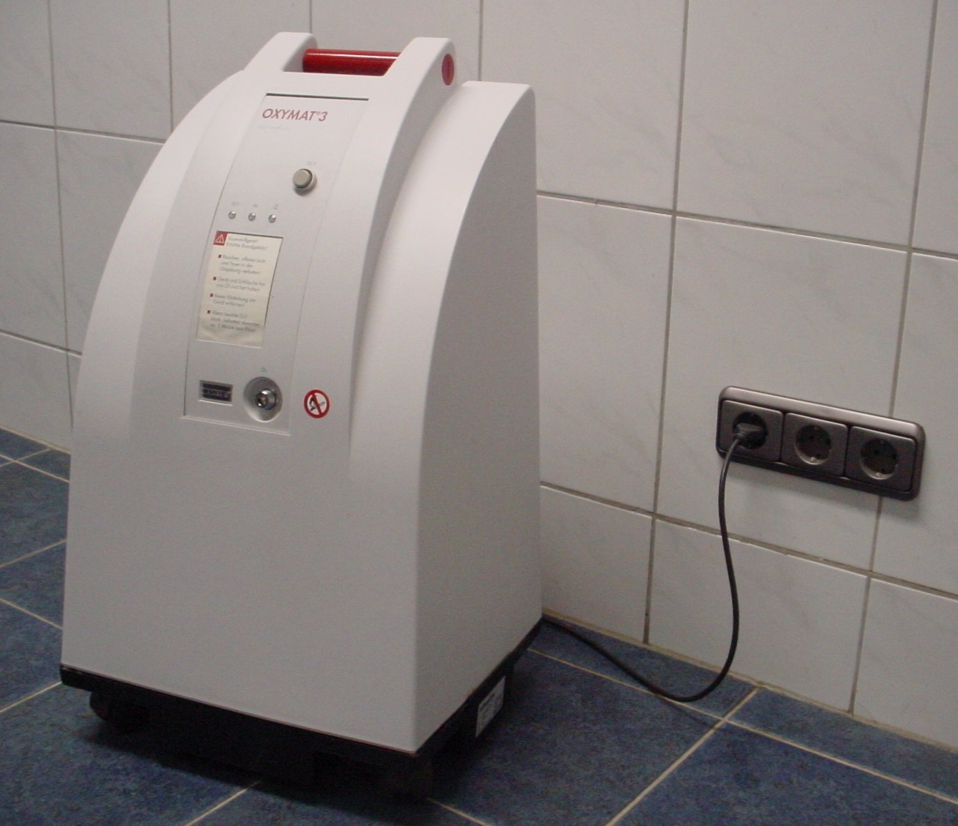 Sauerstoff-Konzentrator